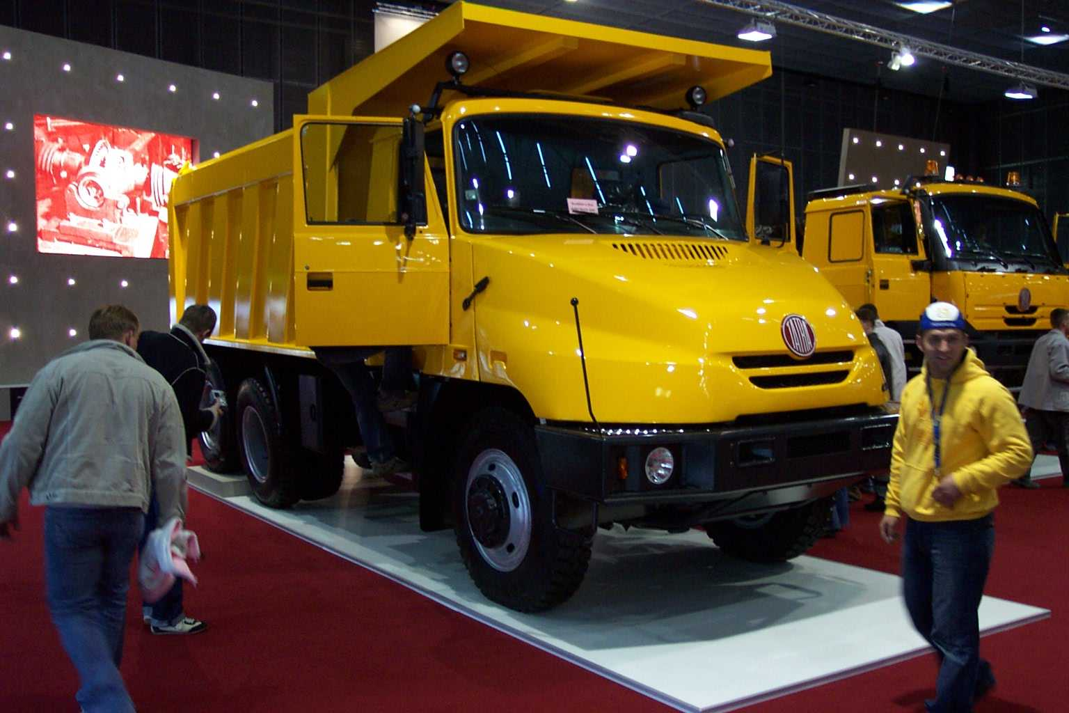 Truck Tatra Jamal at Brno Autotec fair - Nákladní automobil Tatra Jamal na veletrhu Autotec v Brně